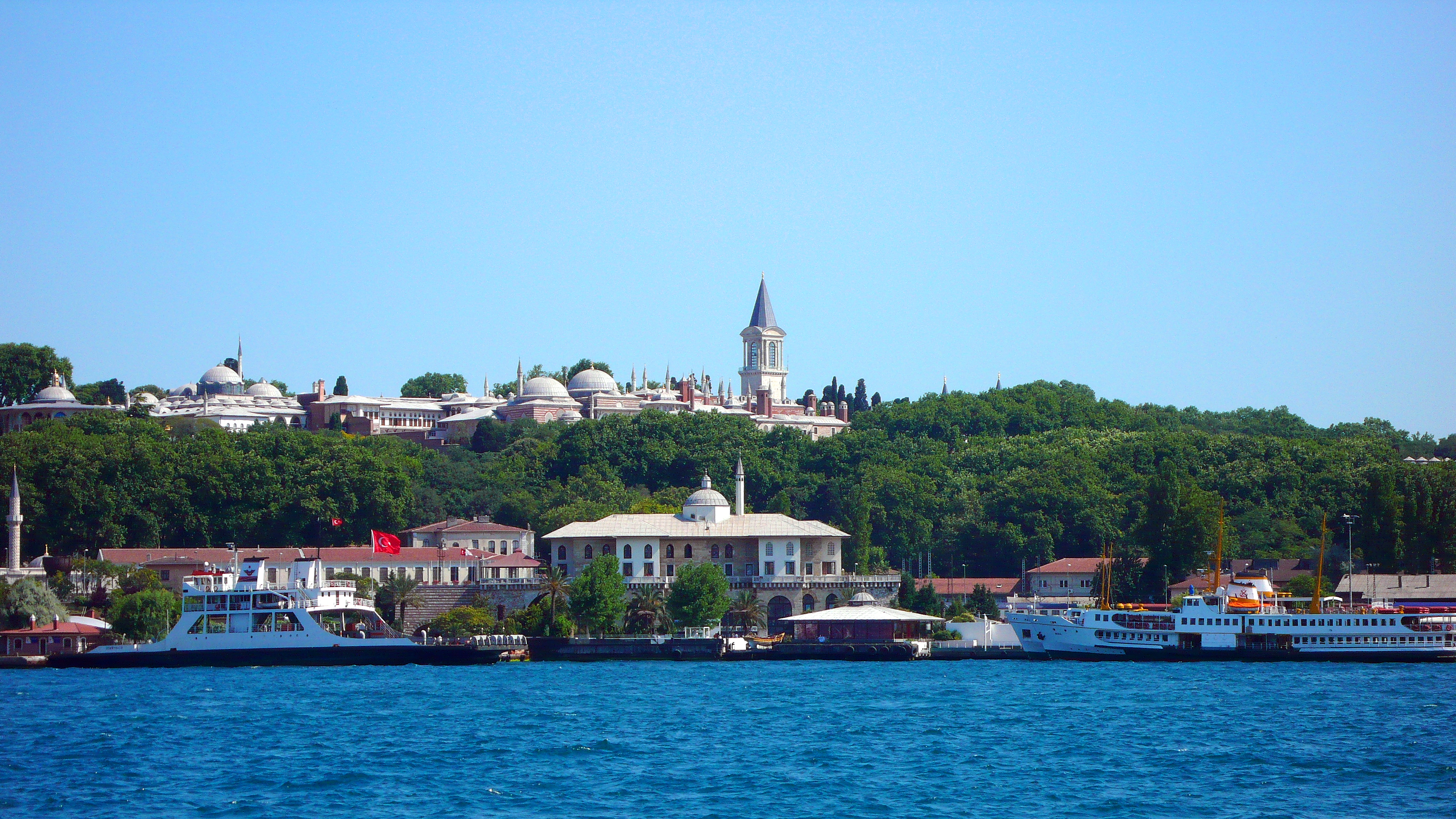 Desde el Cuerno de Oro, el promontorio que lo separa del Mar de Mármara.